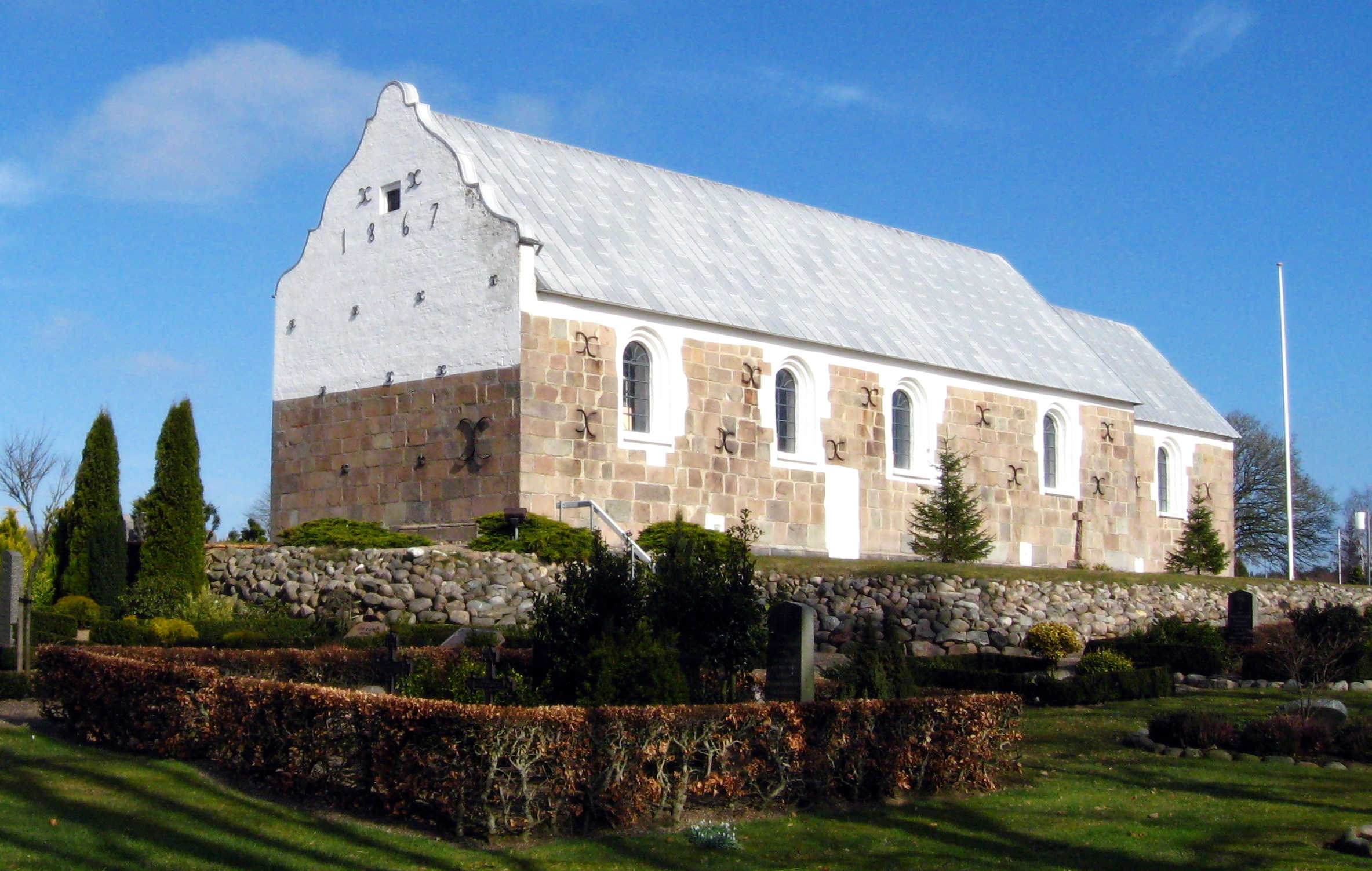 Ugilt Kirke (Hjørring Kommune)